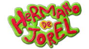 Logo de Hermano de Jorel